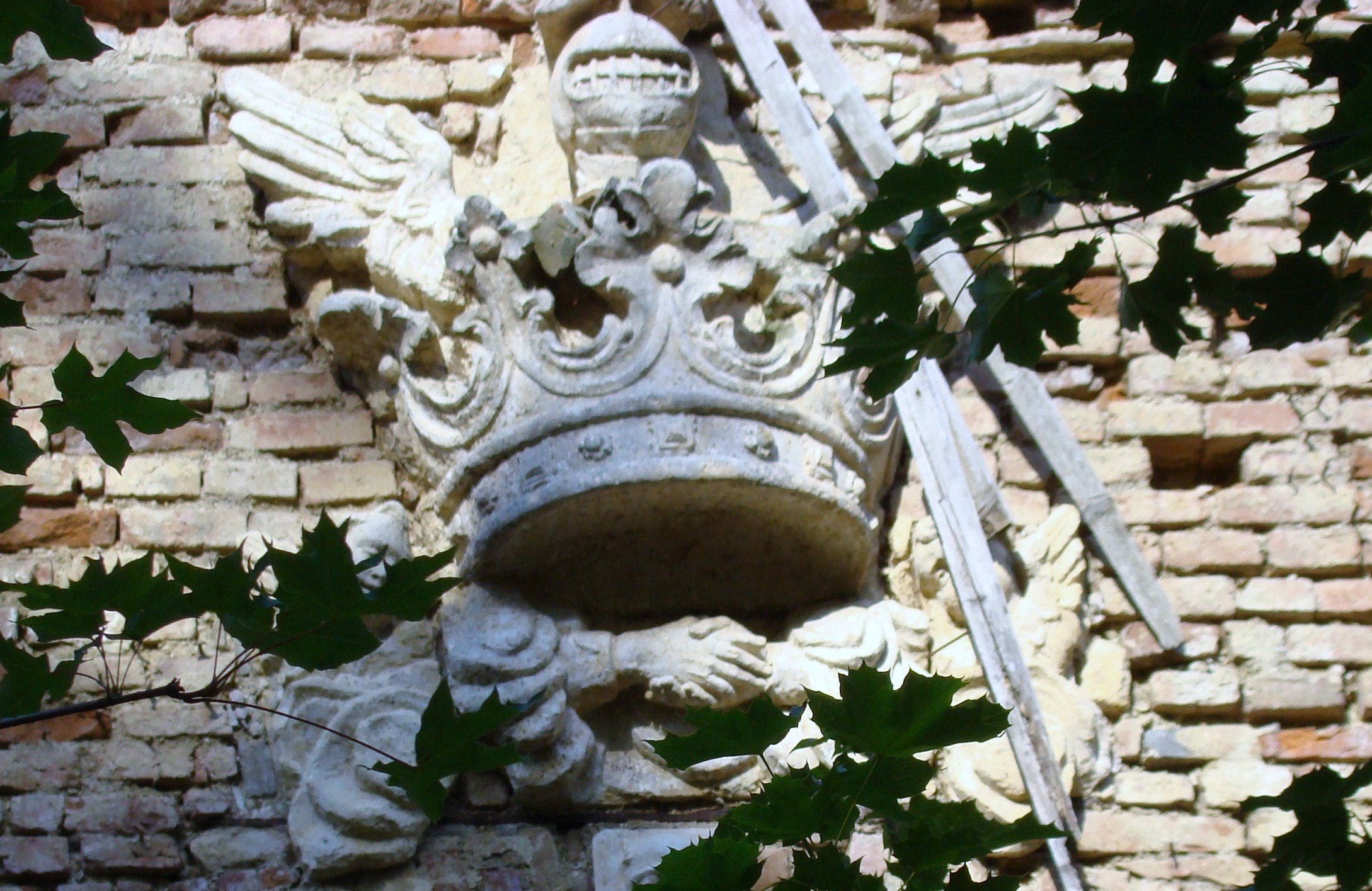 Castelul Teleki, sat COMLOD; comuna MILAŞ